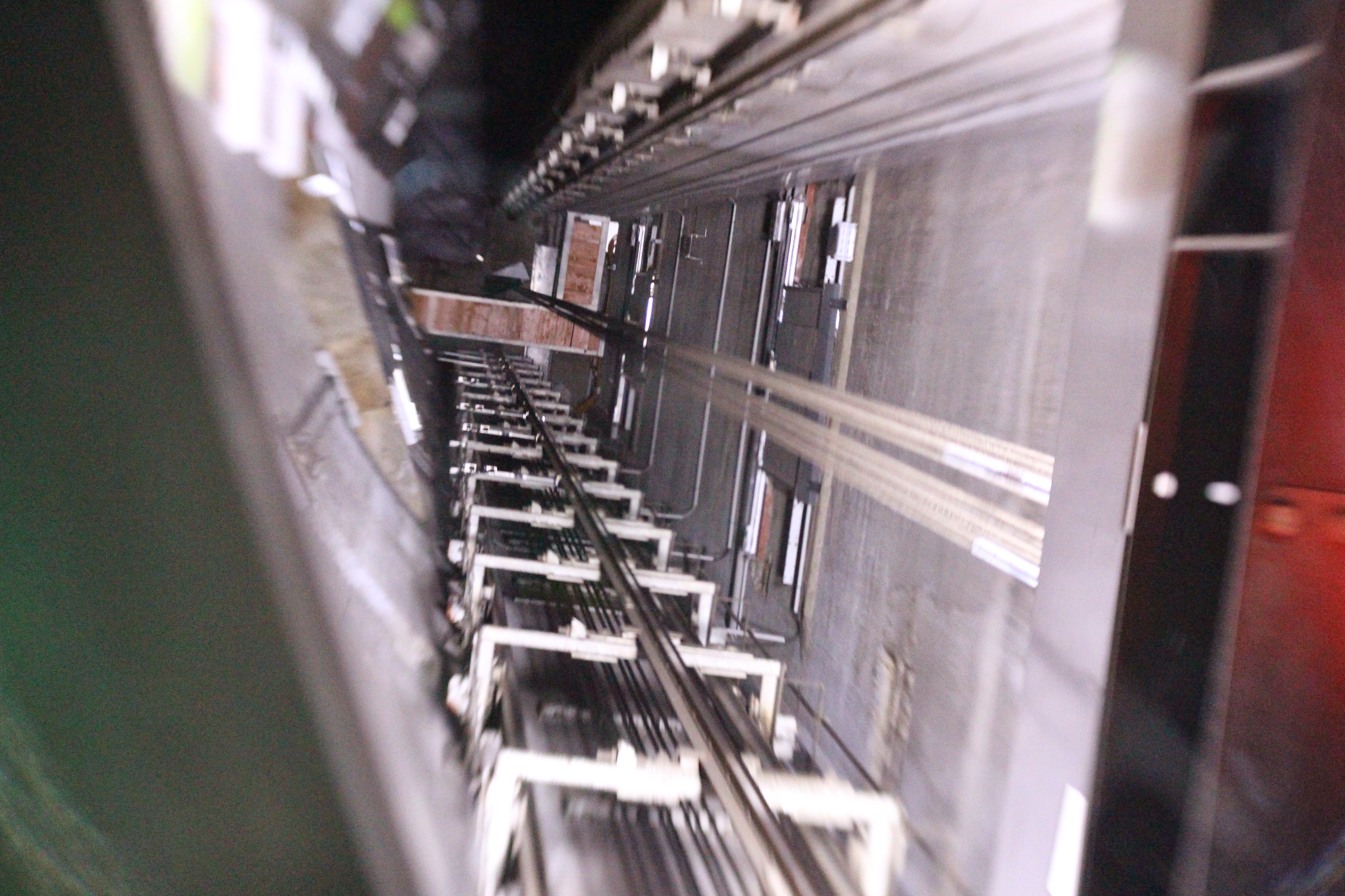 Photowalk Donaupark Vienna